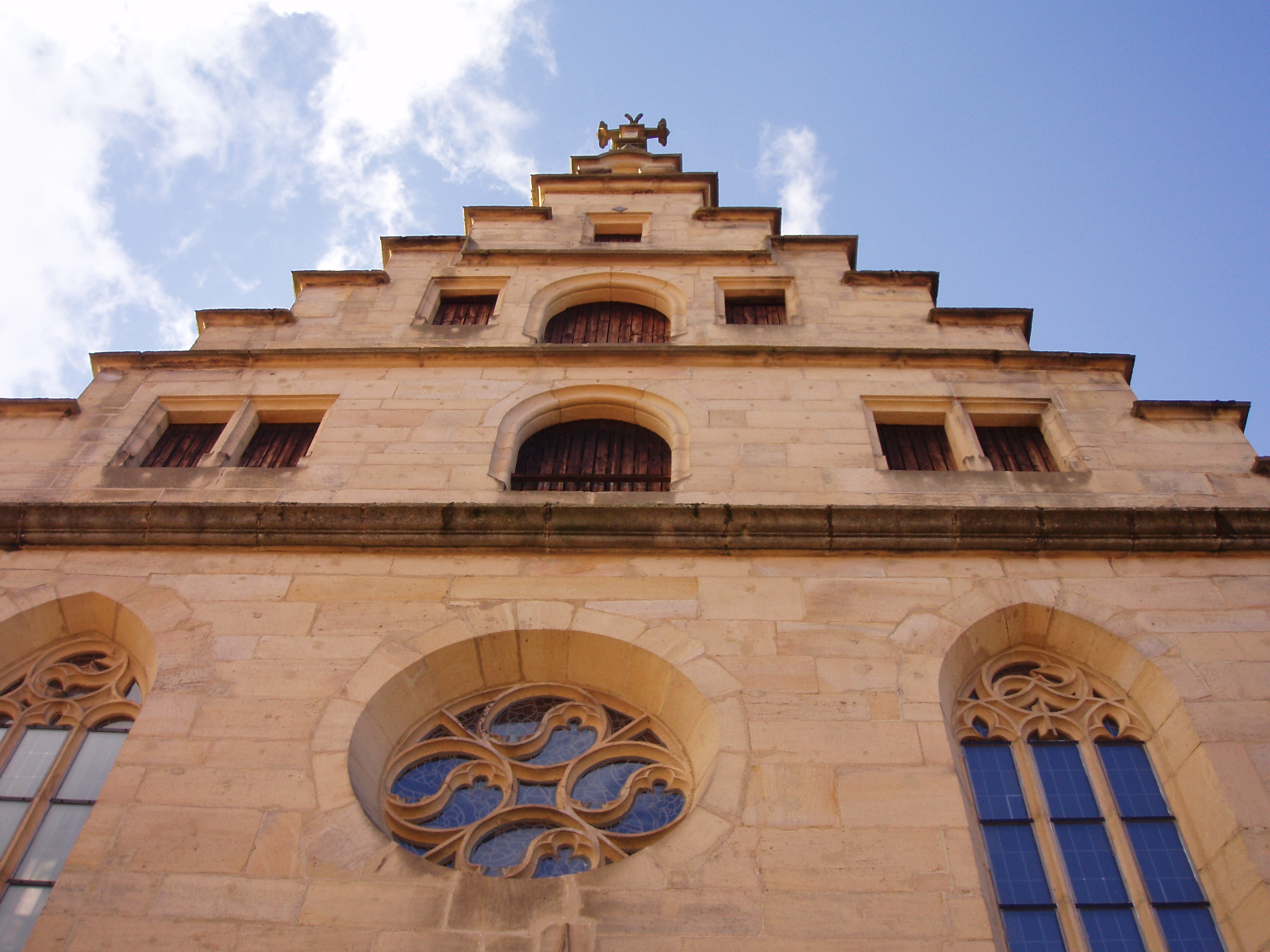 Waldenbuch, Stadtkirche